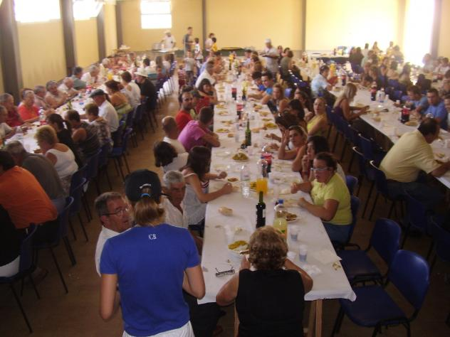 Paella en Villalbarba